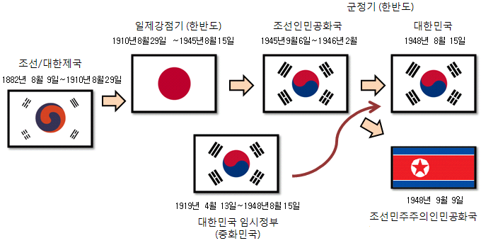 한국의 국기 변천.